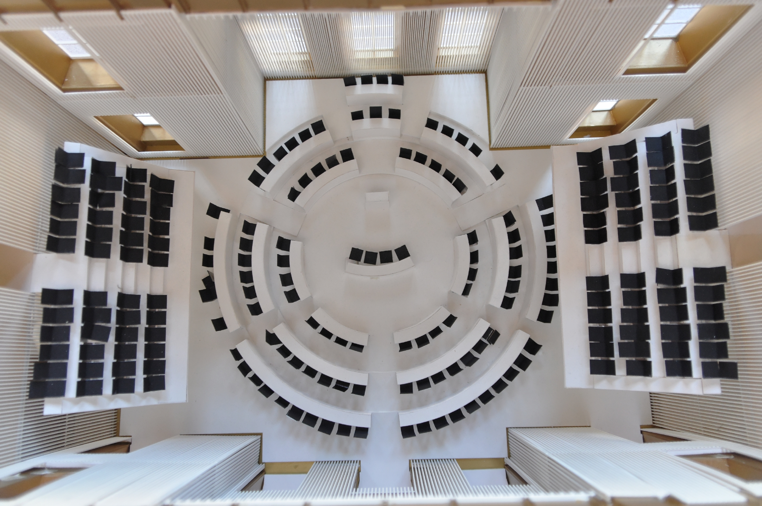 Modell des neuen Plenarsaals Wikipedia im Landtag – Mecklenburg-Vorpommern 19. bis 21. Juni 2013 in Schwerin Fragen zur Nachnutzung Wenn Sie Fragen zur Nachnutzung dieses Bildes haben, können Sie sich jederzeit gern an wenden